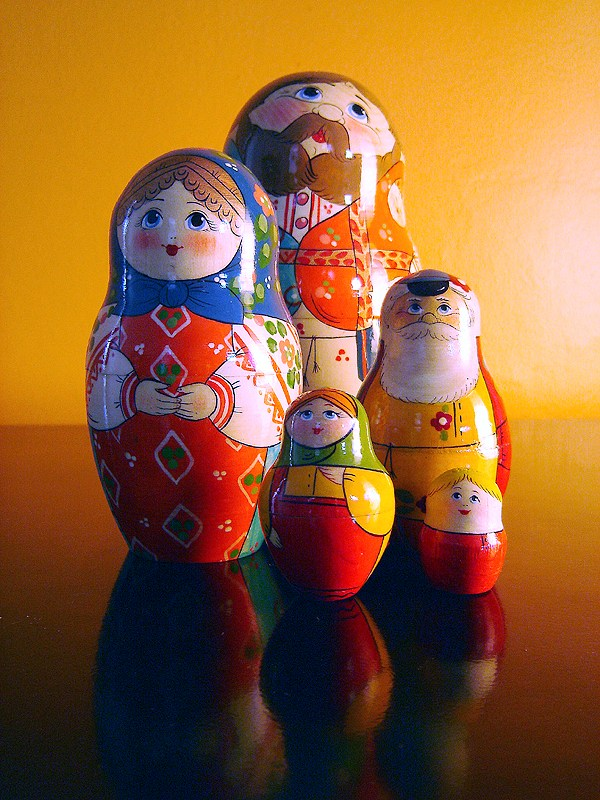 Matryoshka